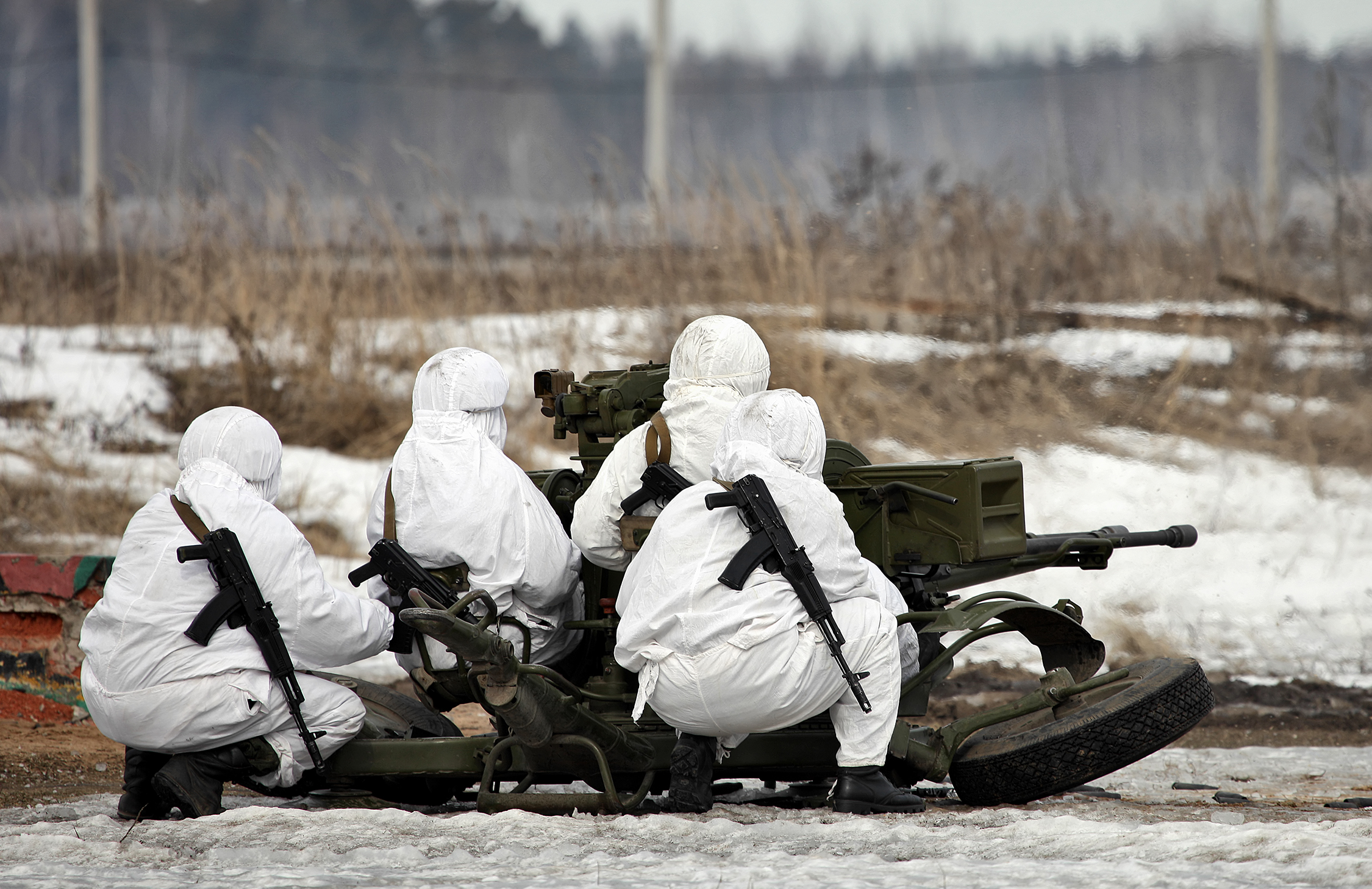 Расчет ЗУ-23-2